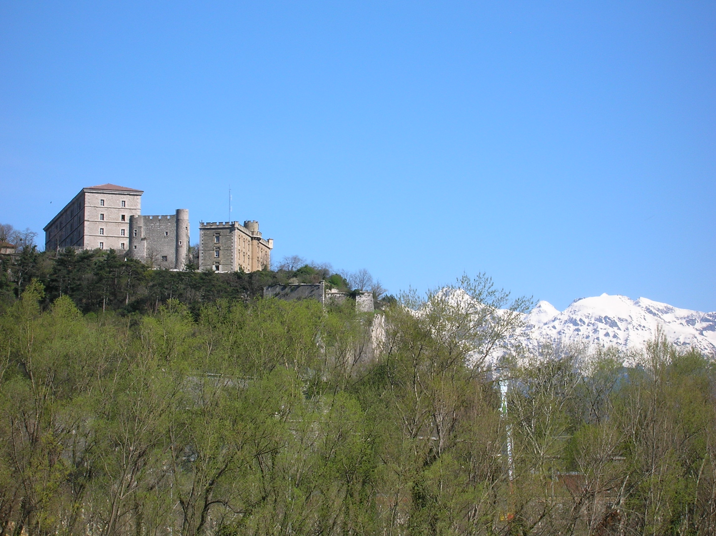 Fort Rabot avec ses batiments universitaires. Au fonds, la chaine de Belledonne au dessus de Grenoble.